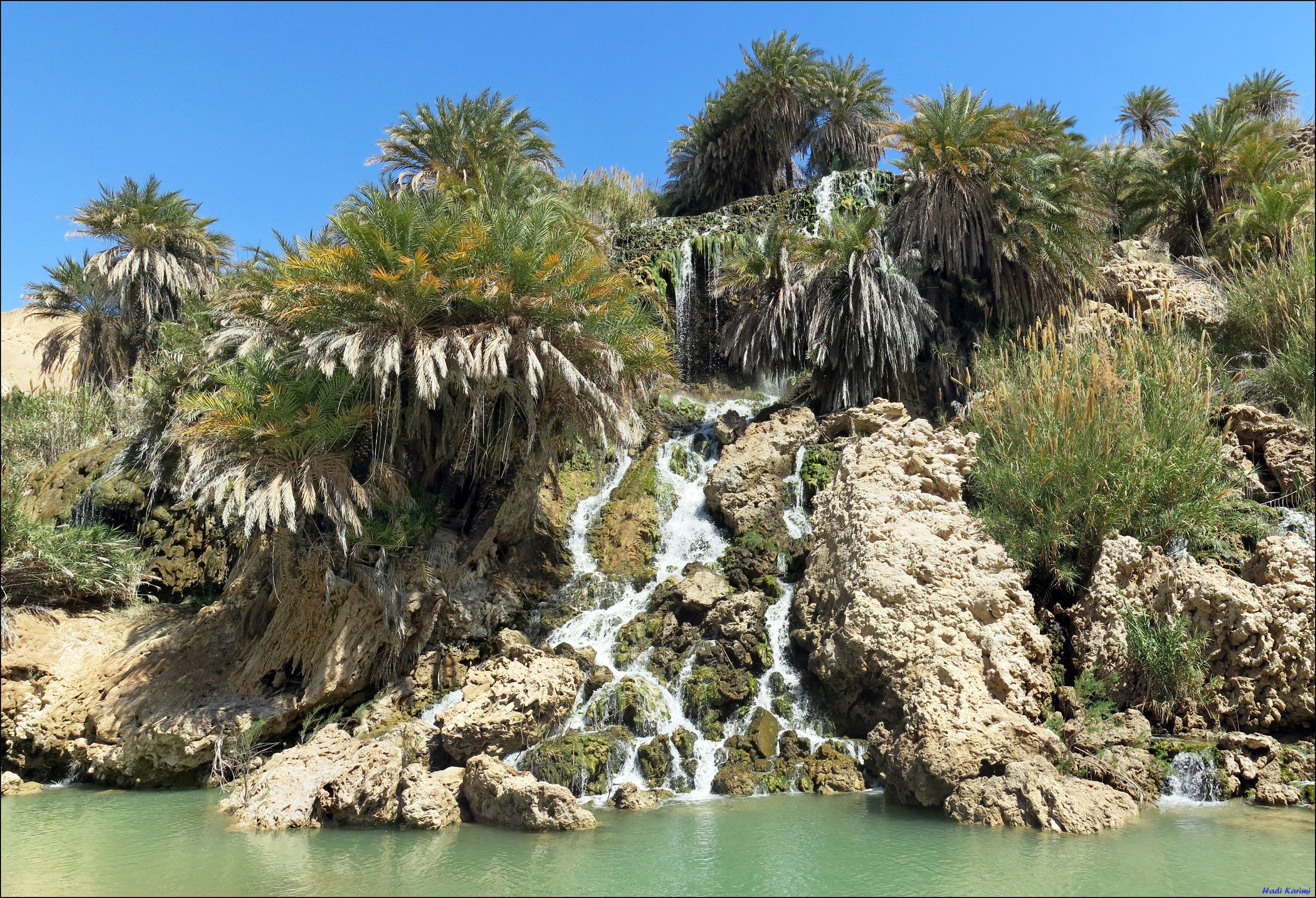 Salty waterfall of Fadami آبشار شور فدامی